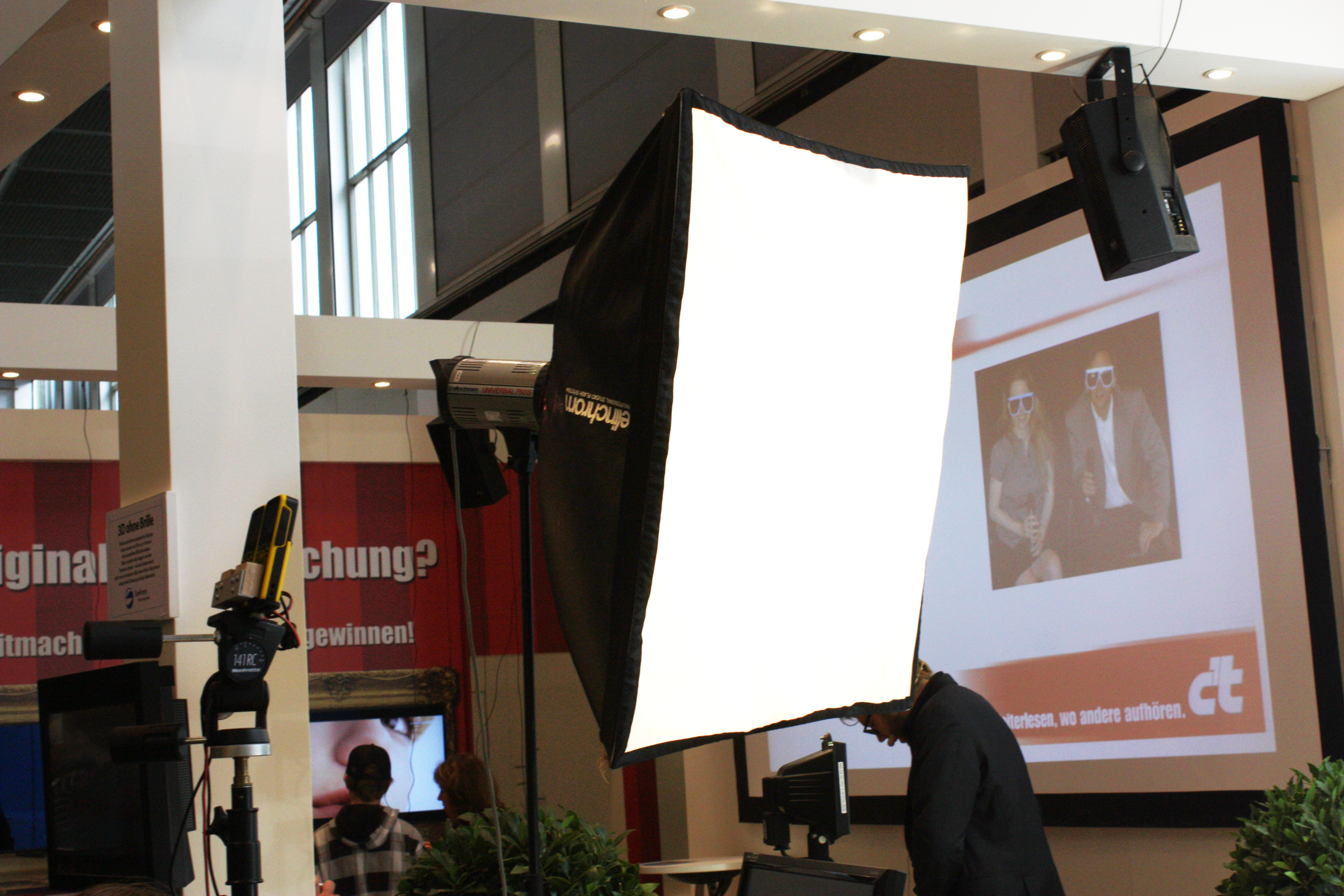 IFA 2010, Berlin; Fotolampe; Studiolampe; Softbox